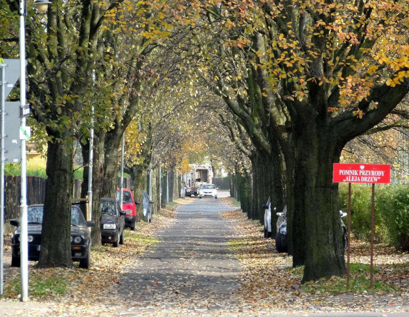 Aleja jarzębów szwedzkich ulica Szymanowskiego w Bydgoszczy - pomnik przyrody